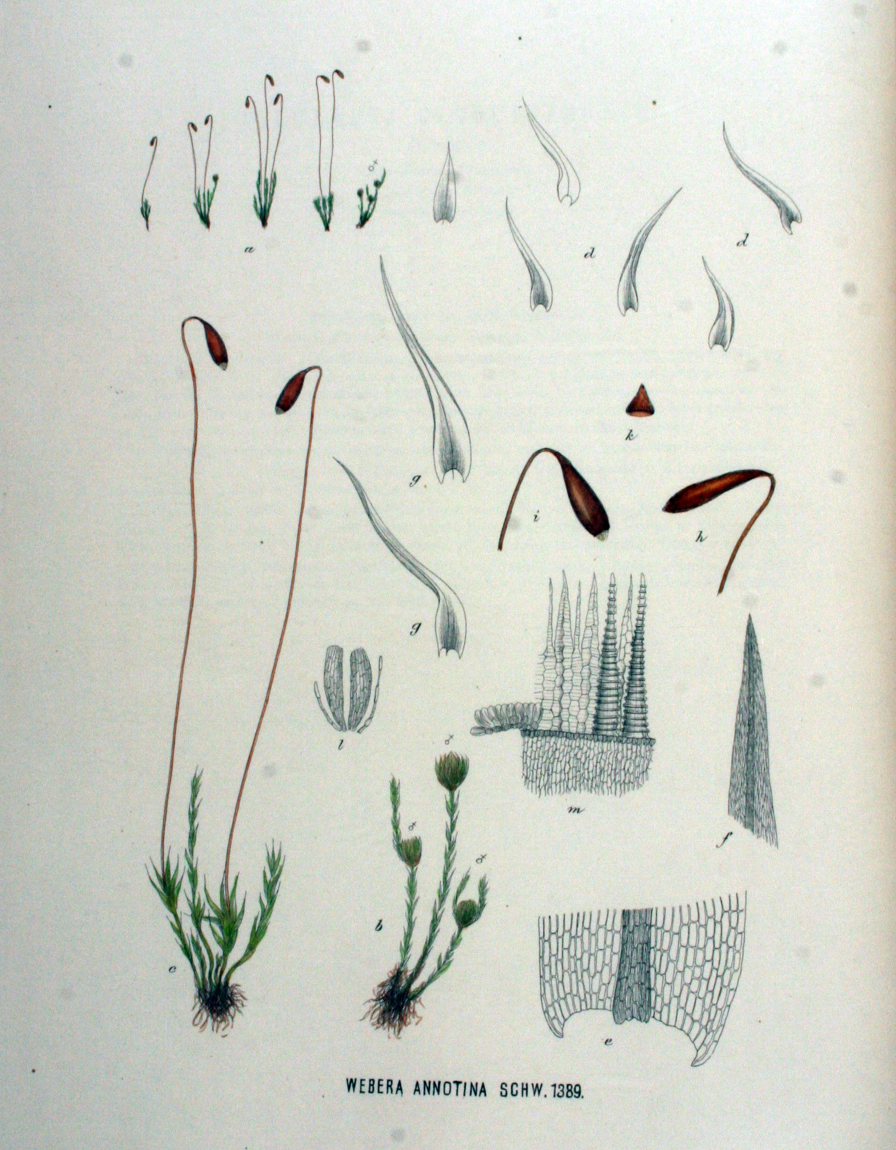 Ceratodon purpureus subsp. purpureus, syn. Webera annotina (Hedw.) Bruch